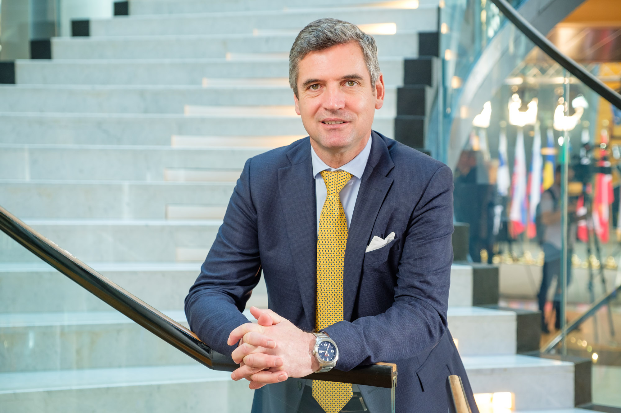 Herbert Dorfmann 2019